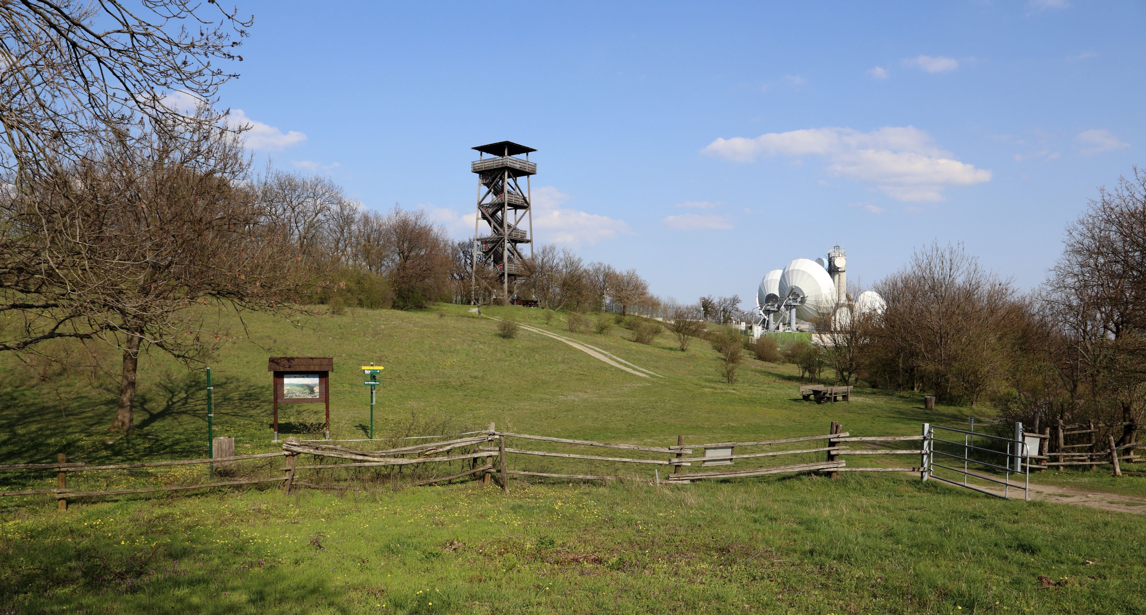 Gipfelregion der 344 Meter hohen Königswarte, Österreichs östlichster Berg. In der Bildmitte der 22,7 Meter hohe und 2001 errichtete Aussichtsturm und rechts die Richtung Osten ausgerichtete "Lauschstation", die ab 1958 mit Hilfe der USA errichtet wurde.